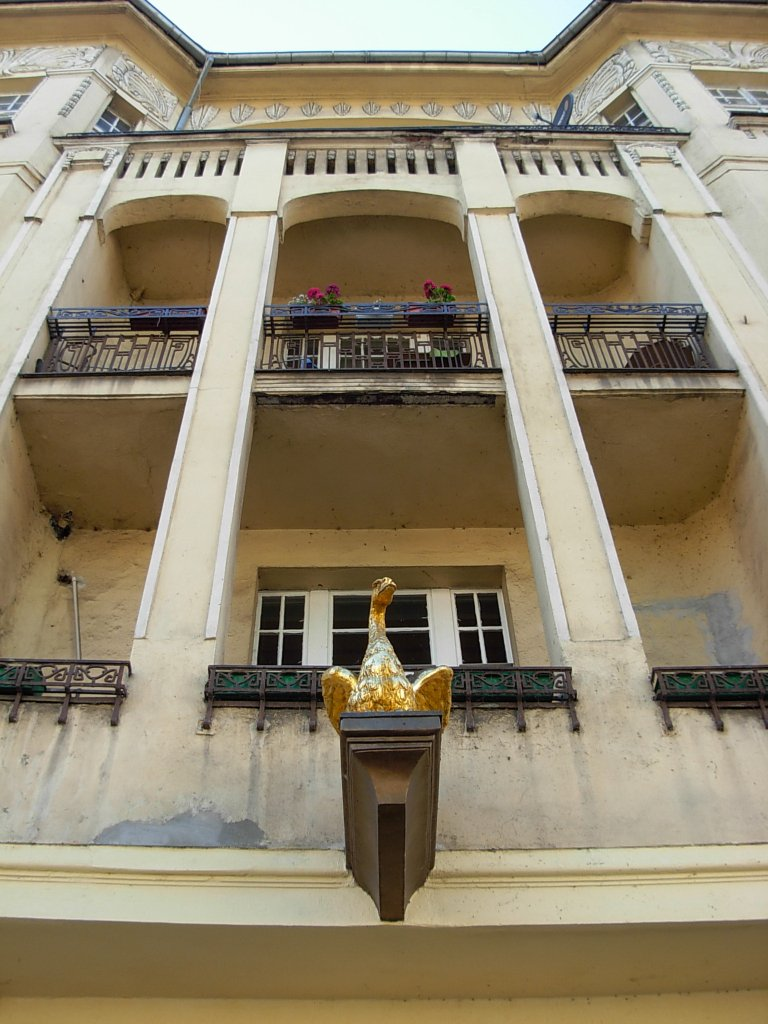 Kamienica Gdańska 5 w Bydgoszczy